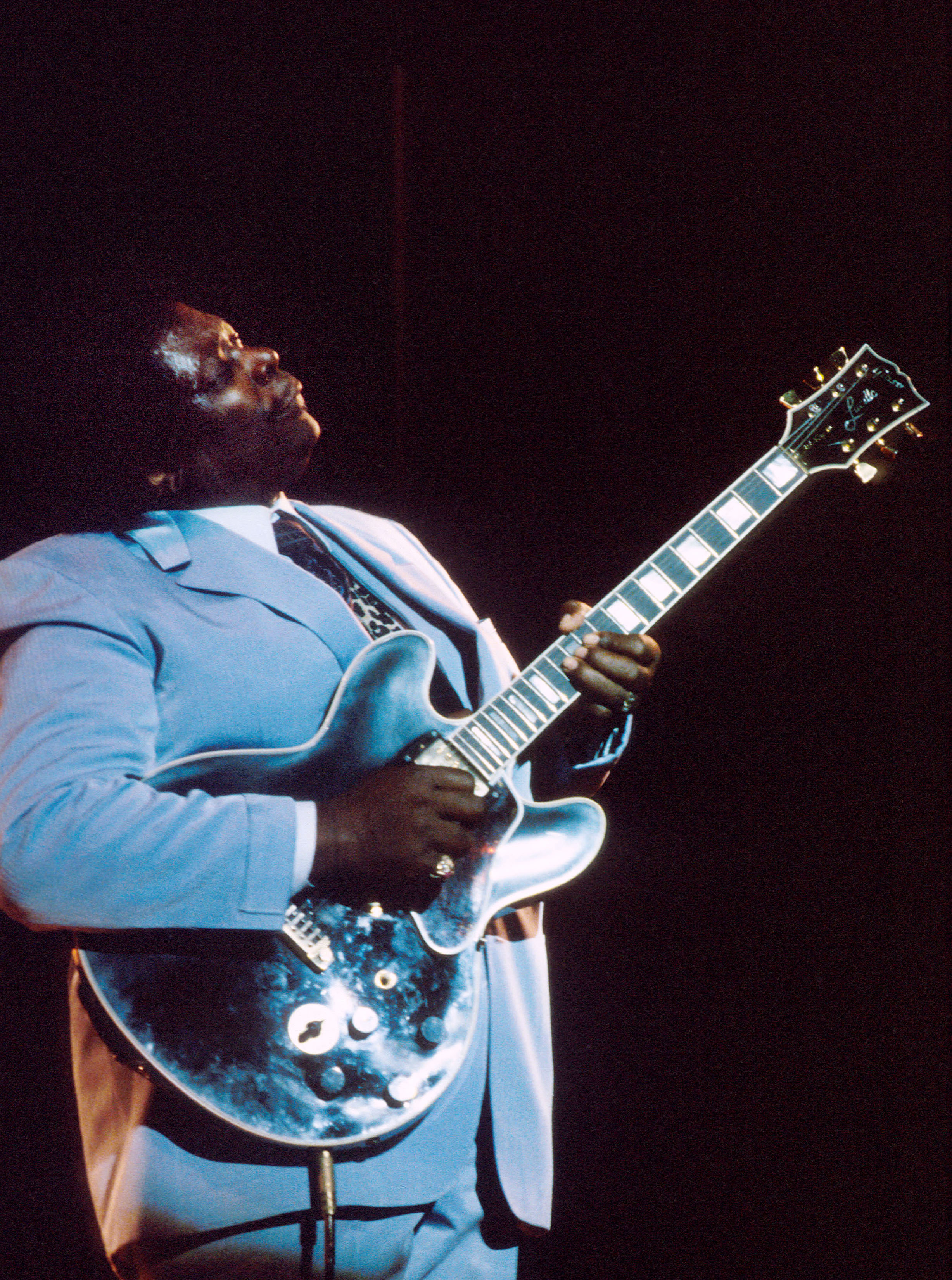 Il chitarrista blues B.B. King